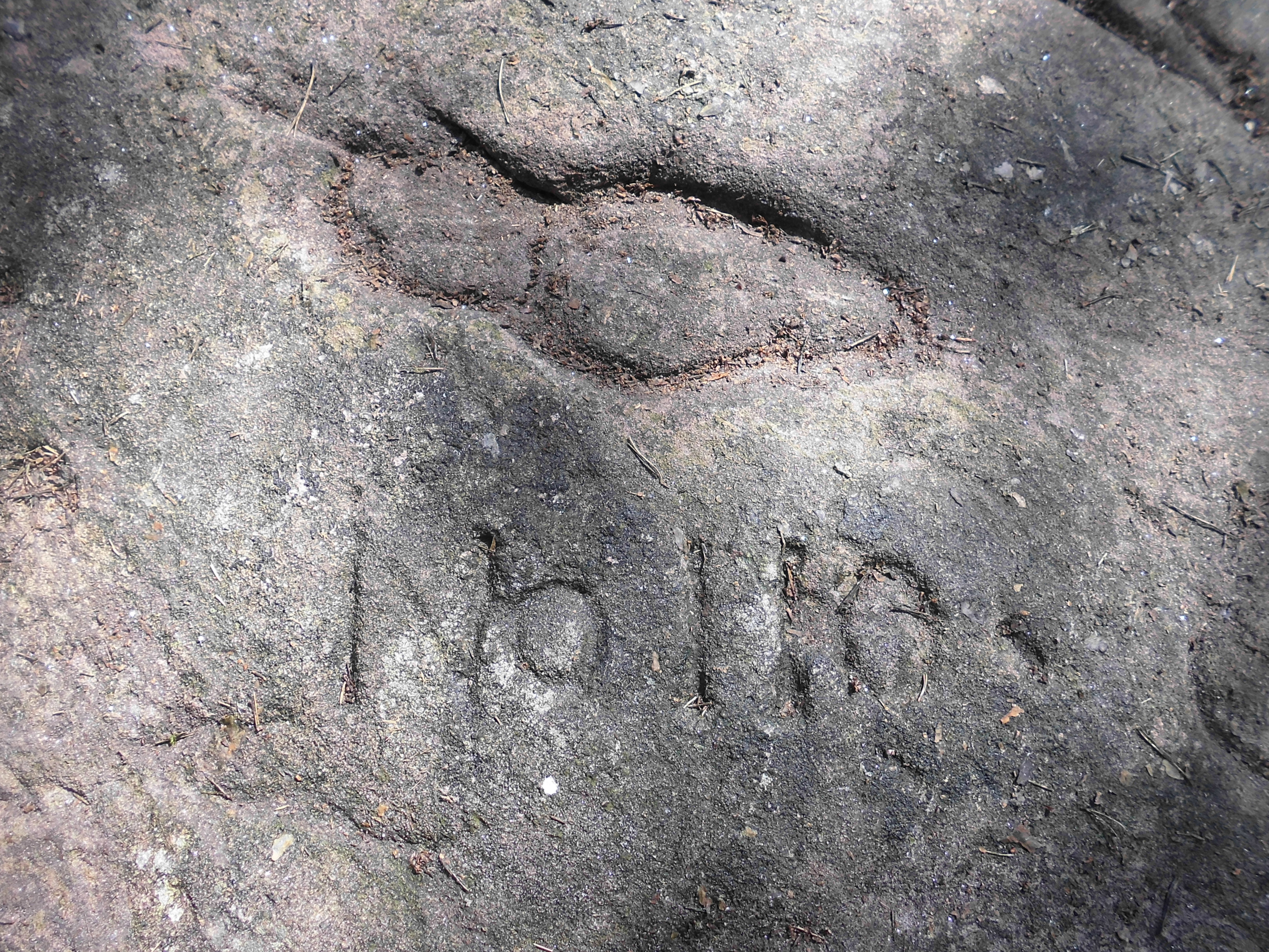 Der Christophel-Schuh, ein Loogfels an der Nordgrenze der pfälzischen Stadt Deidesheim zu Wachenheim